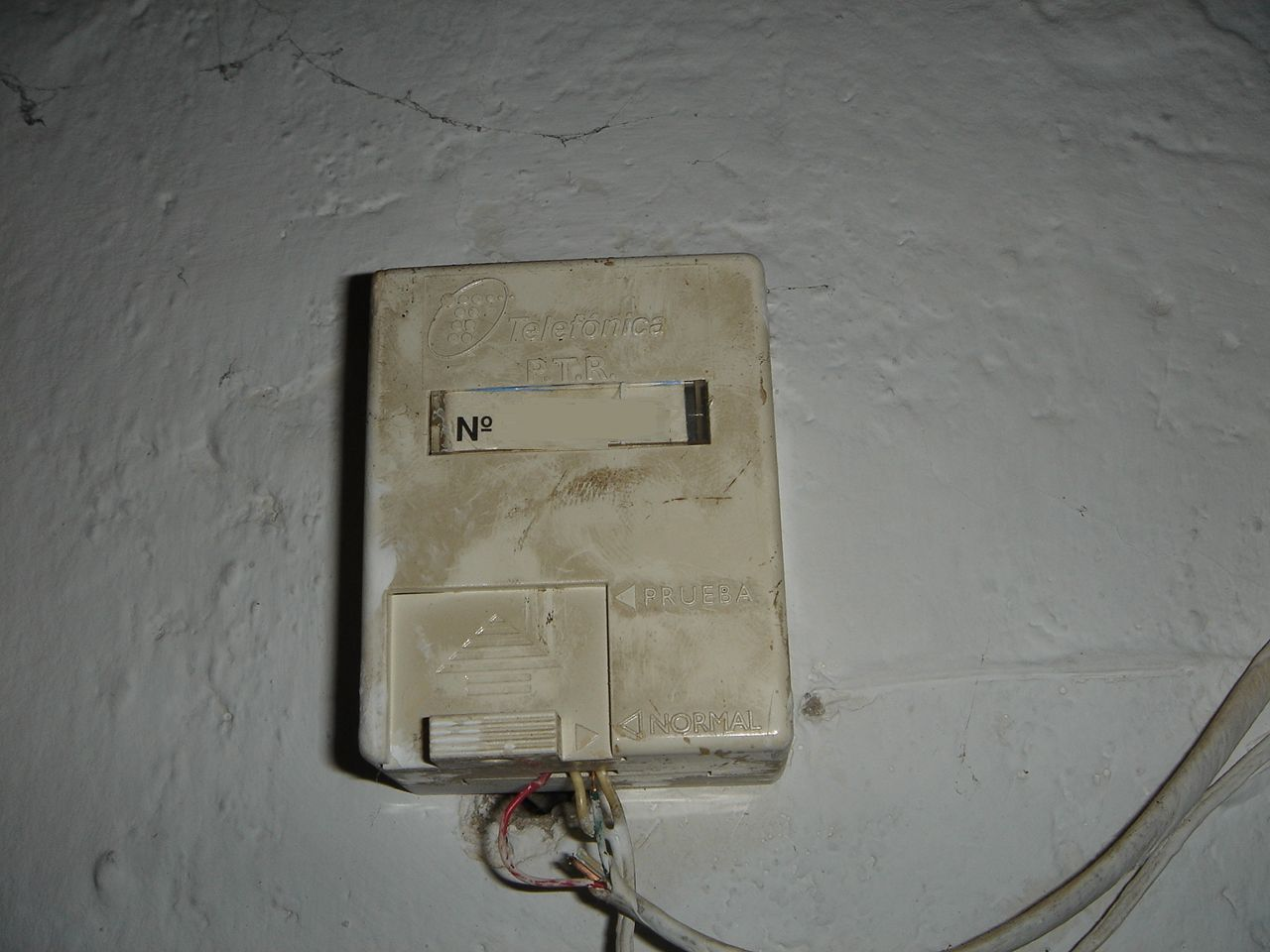 PTR (Punto Terminal de Red) de la compañía Telefónica S.A., España.